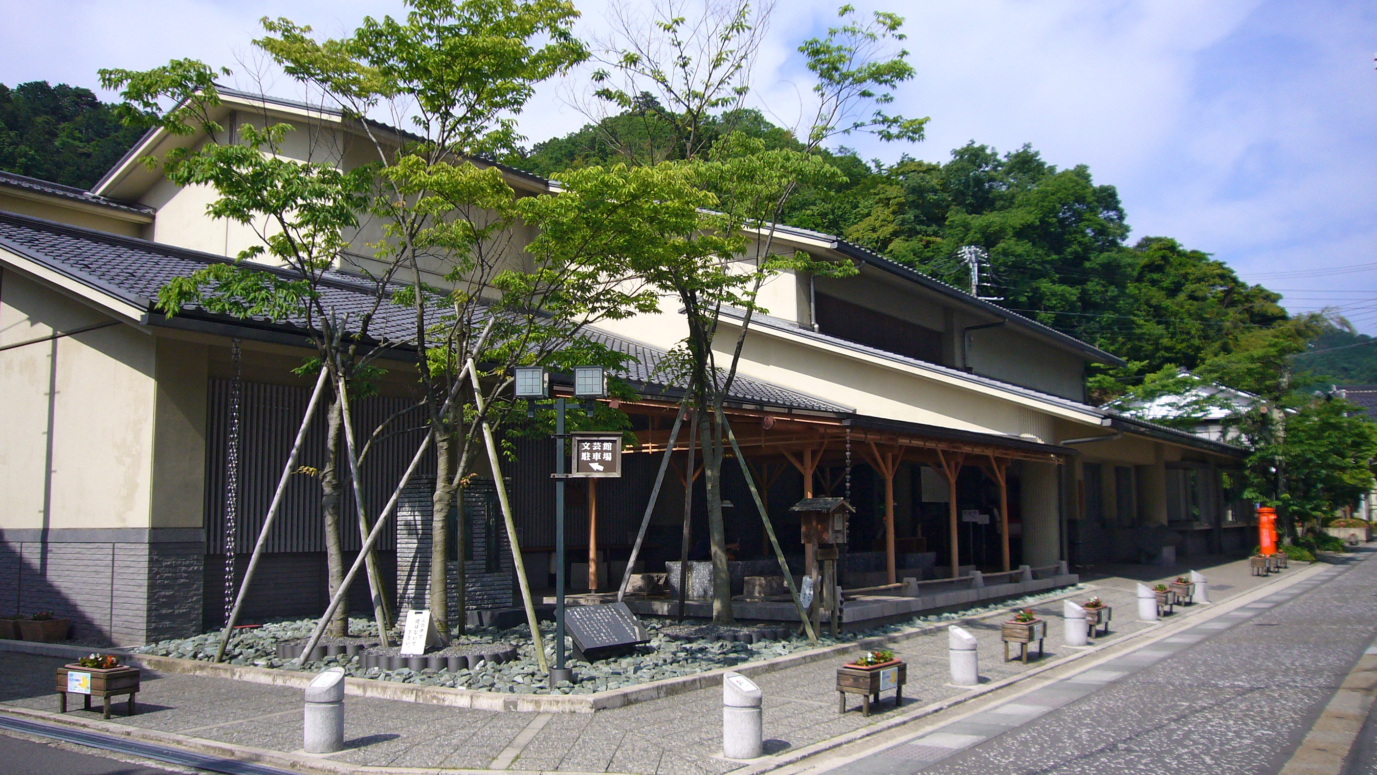 Kinosaki-cho Bungeikan, Kinosaki Onsen in Toyooka, Hyogo, Japan